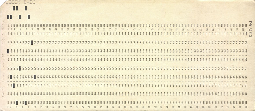 Karta dziurkowana, używana w Centrum Informatycznym Politechniki Wrocławskiej, autor zdjęcia Nova